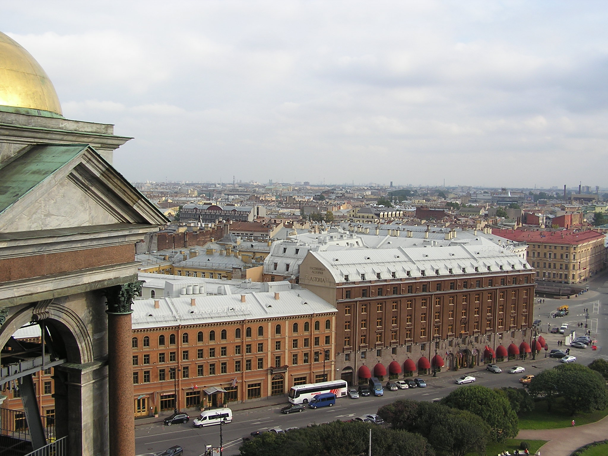 Санкт-Петербург